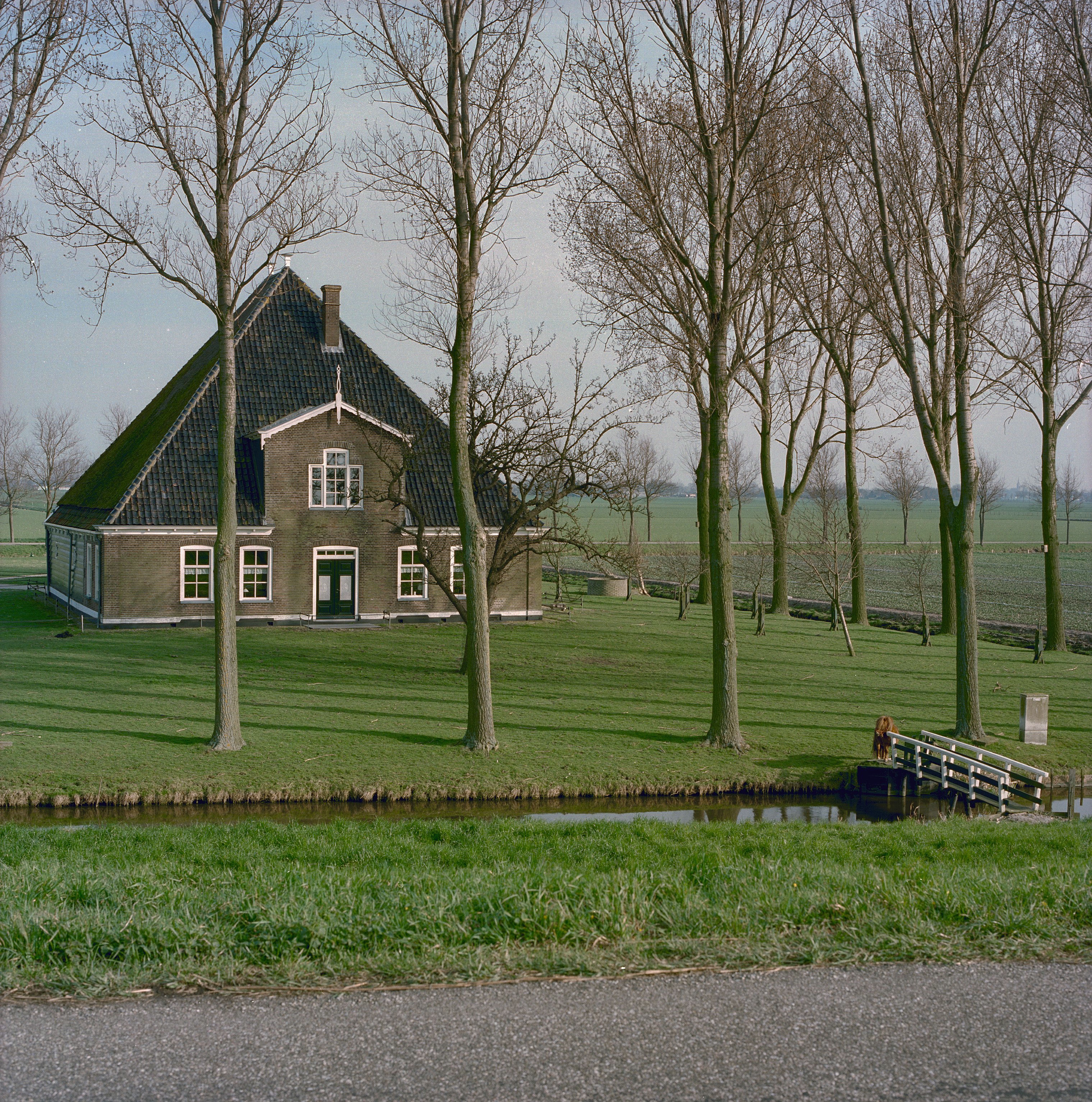 Beemster: Overzicht (opmerking: Werelderfgoed Beemster)